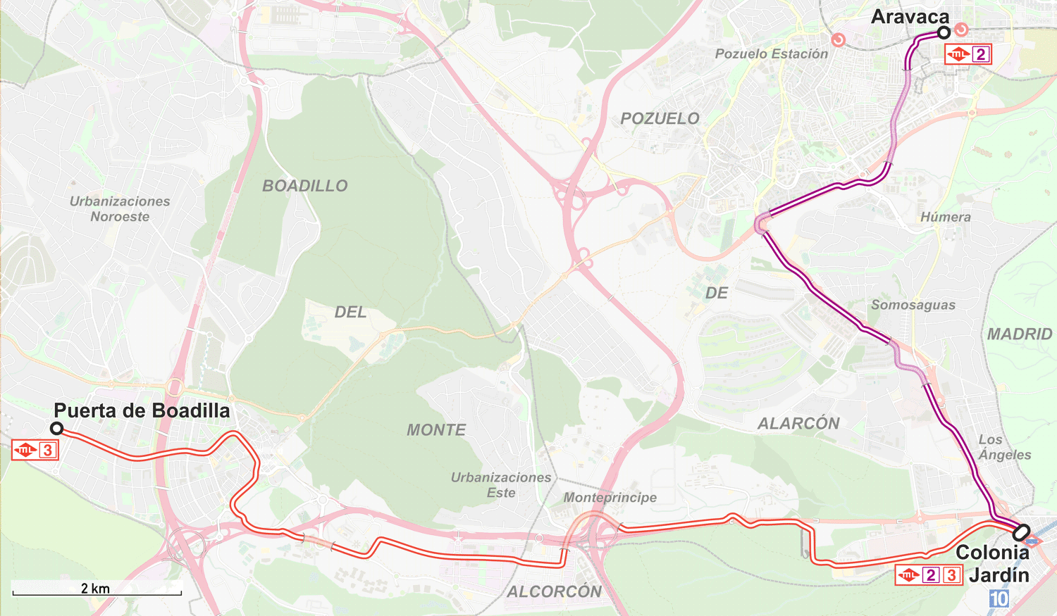 Geografischer Übersichtsplan der Linien ML1 und ML2 der metro ligero di Madrid